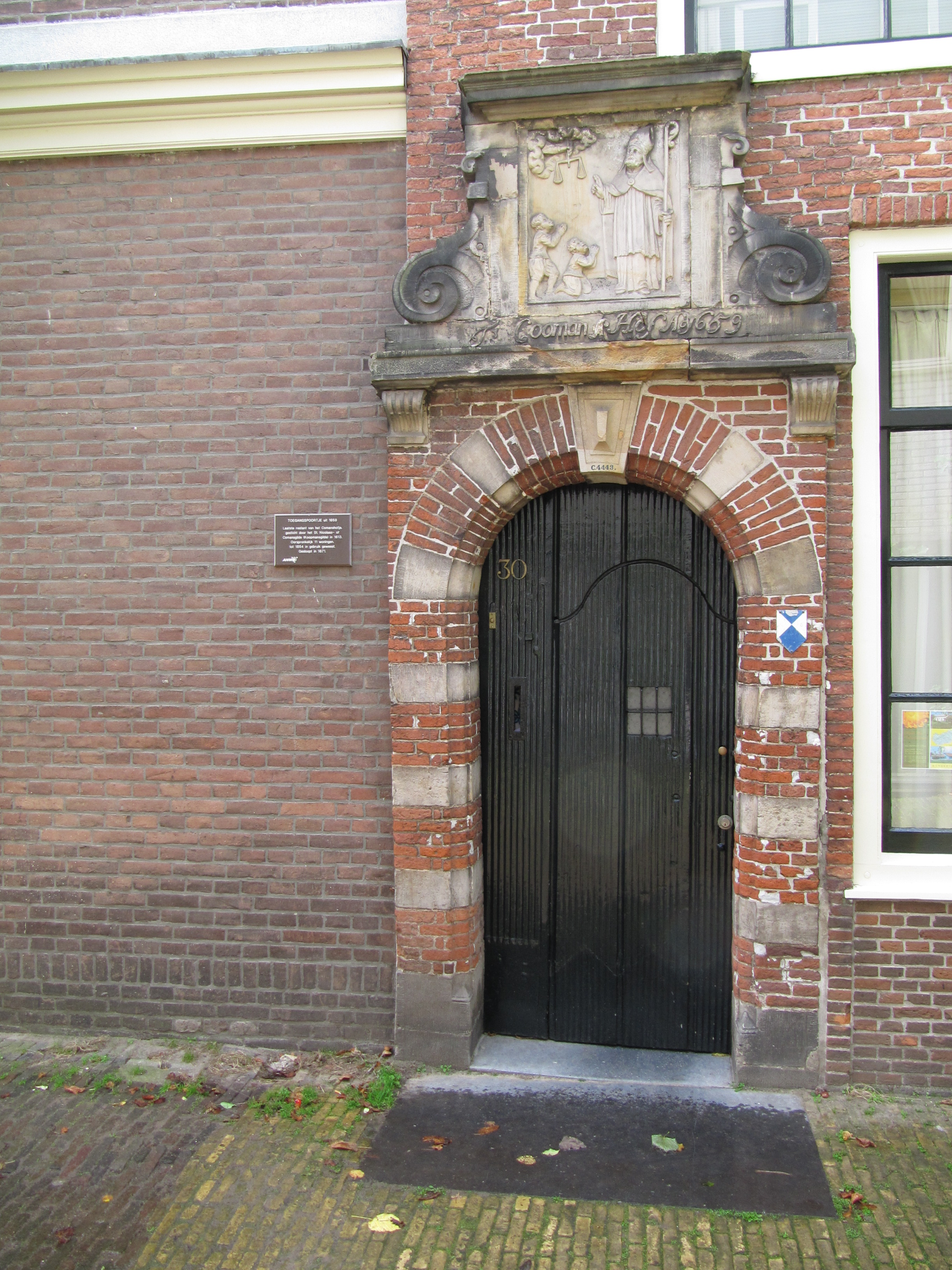 RM34426 Haarlem - Witte Herenstraat.jpg